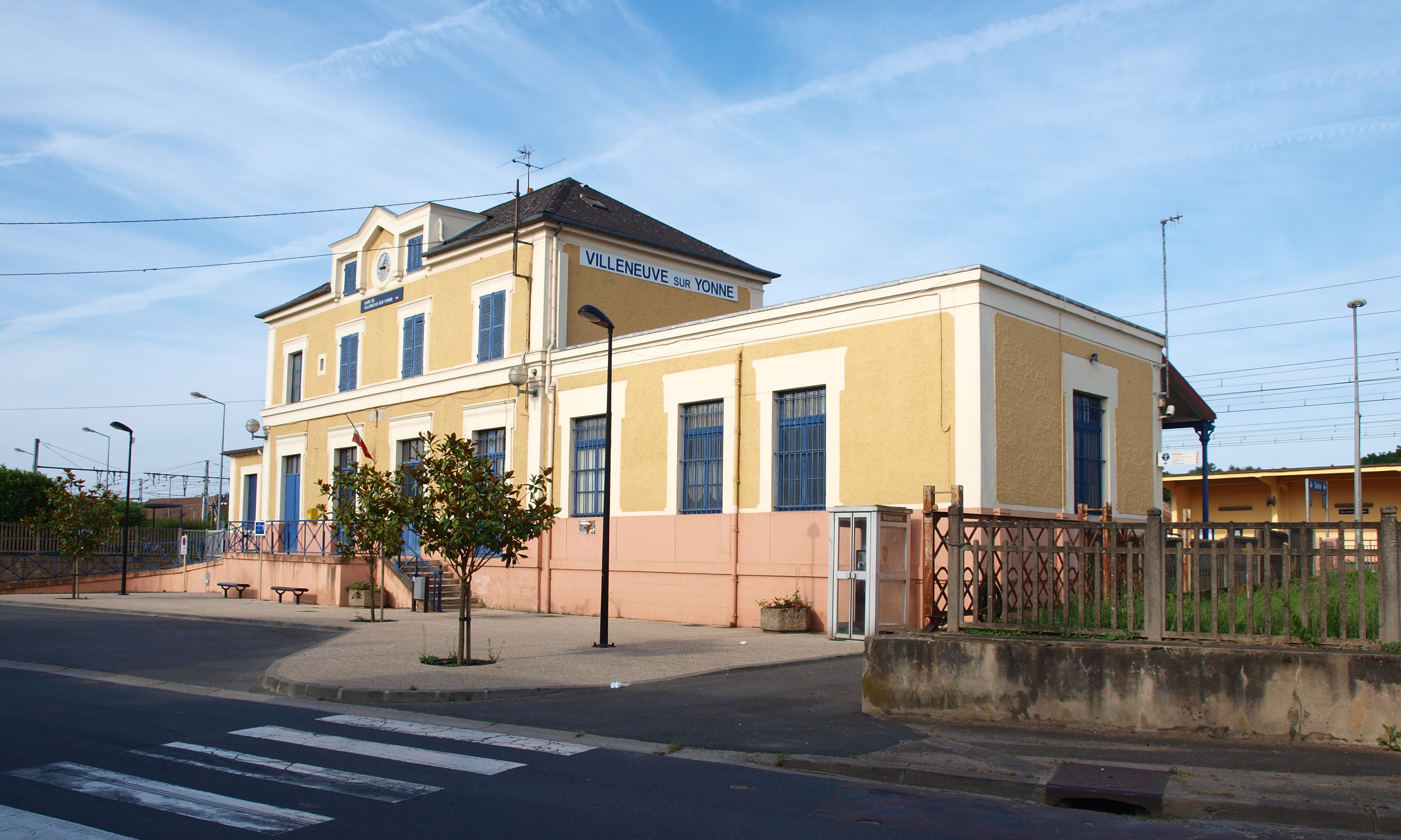 Villeneuve-sur-Yonne (Yonne, France) ; la gare ferroviaire.